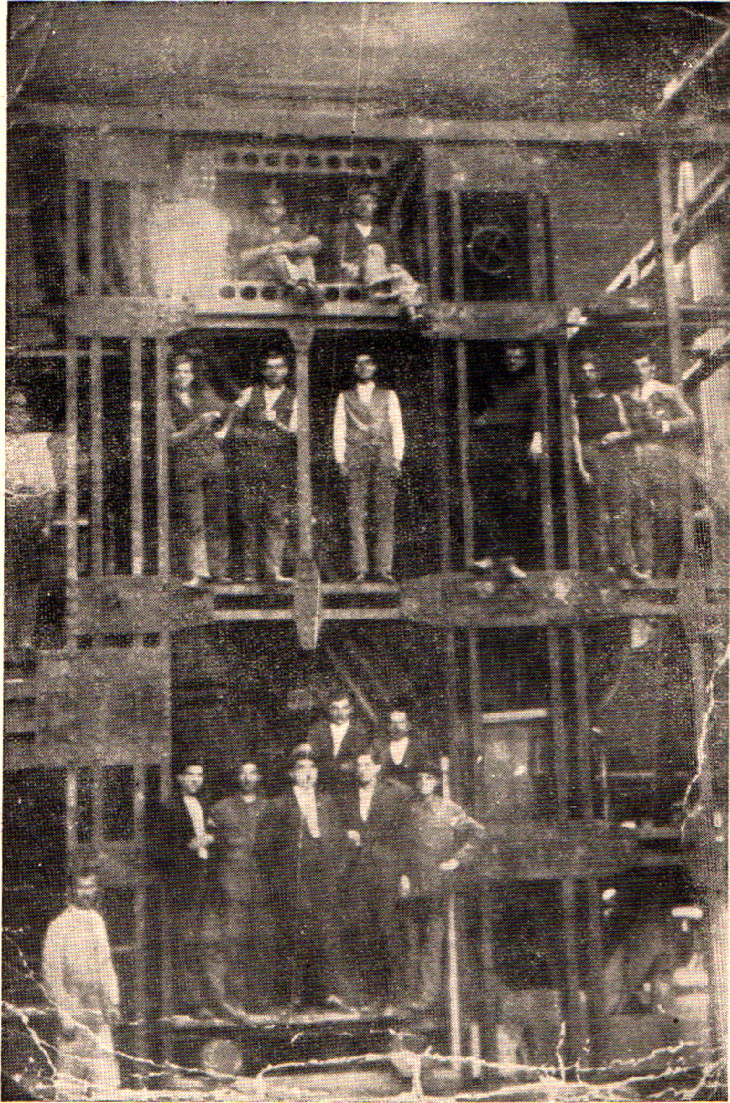 Srpskohrvatski / српскохрватски: Grupa komunista i naprednih radnika jednog električarskog preduzeća u Beogradu 1924. godine.